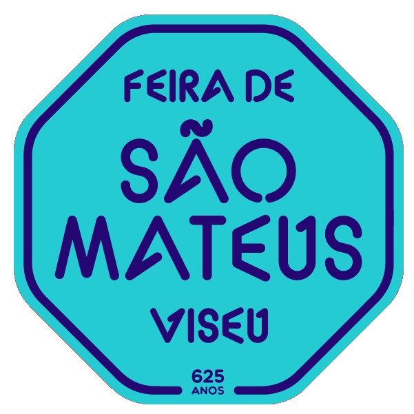 Feira De São Mateus Viseu - 625